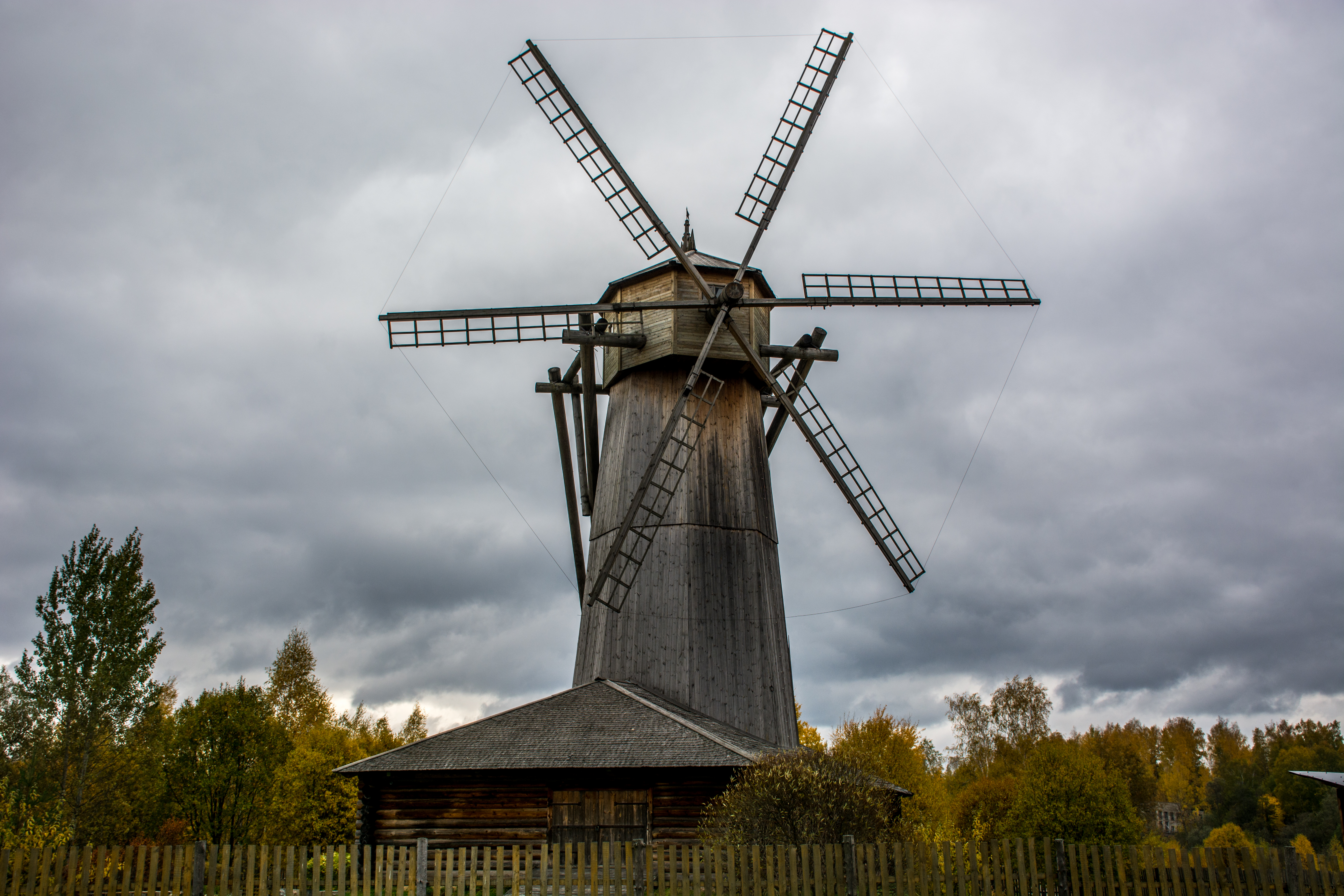 Ветряная мельница из с. Кочемлево (Москва и Московская область, Истра, у стен Ново-Иерусалимского монастыря 550 м к ЗЮЗ от Елизаветинской башни)